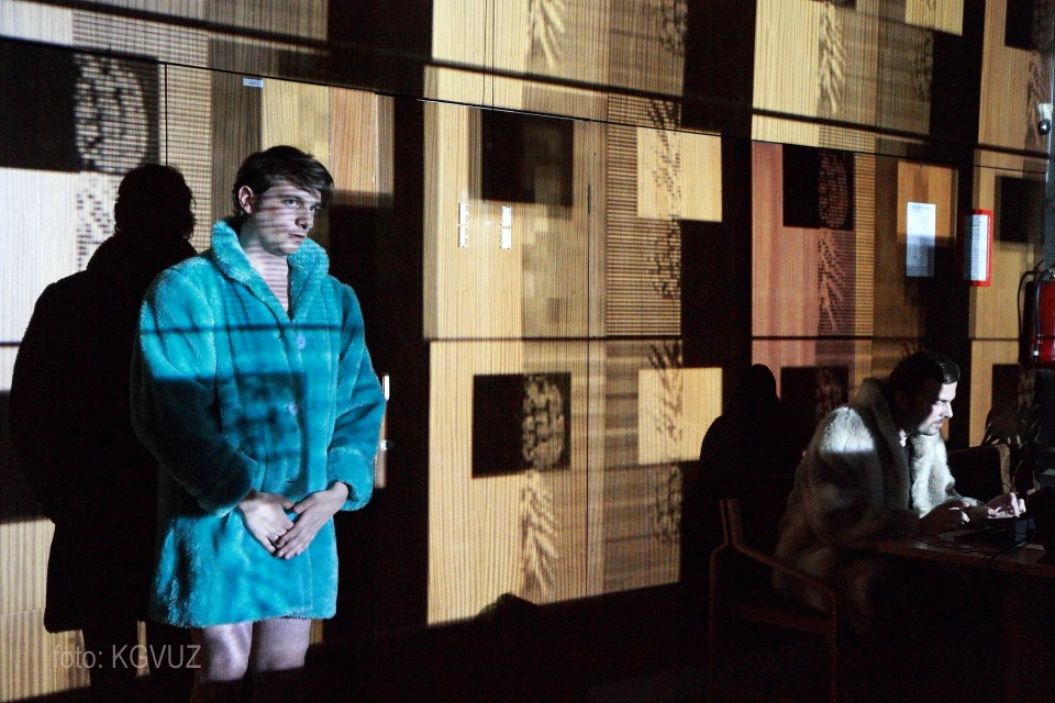 Martin Macháček: MeNe KeKel Mrkev v řiti a křik